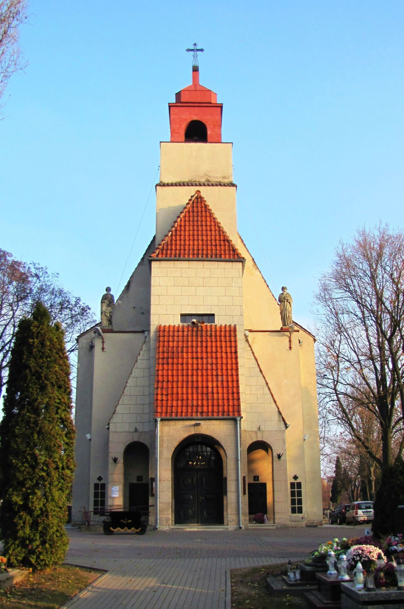 Kościół pw. Najświętszego Zbawiciela, Lublin – proj. A. Gruchalski